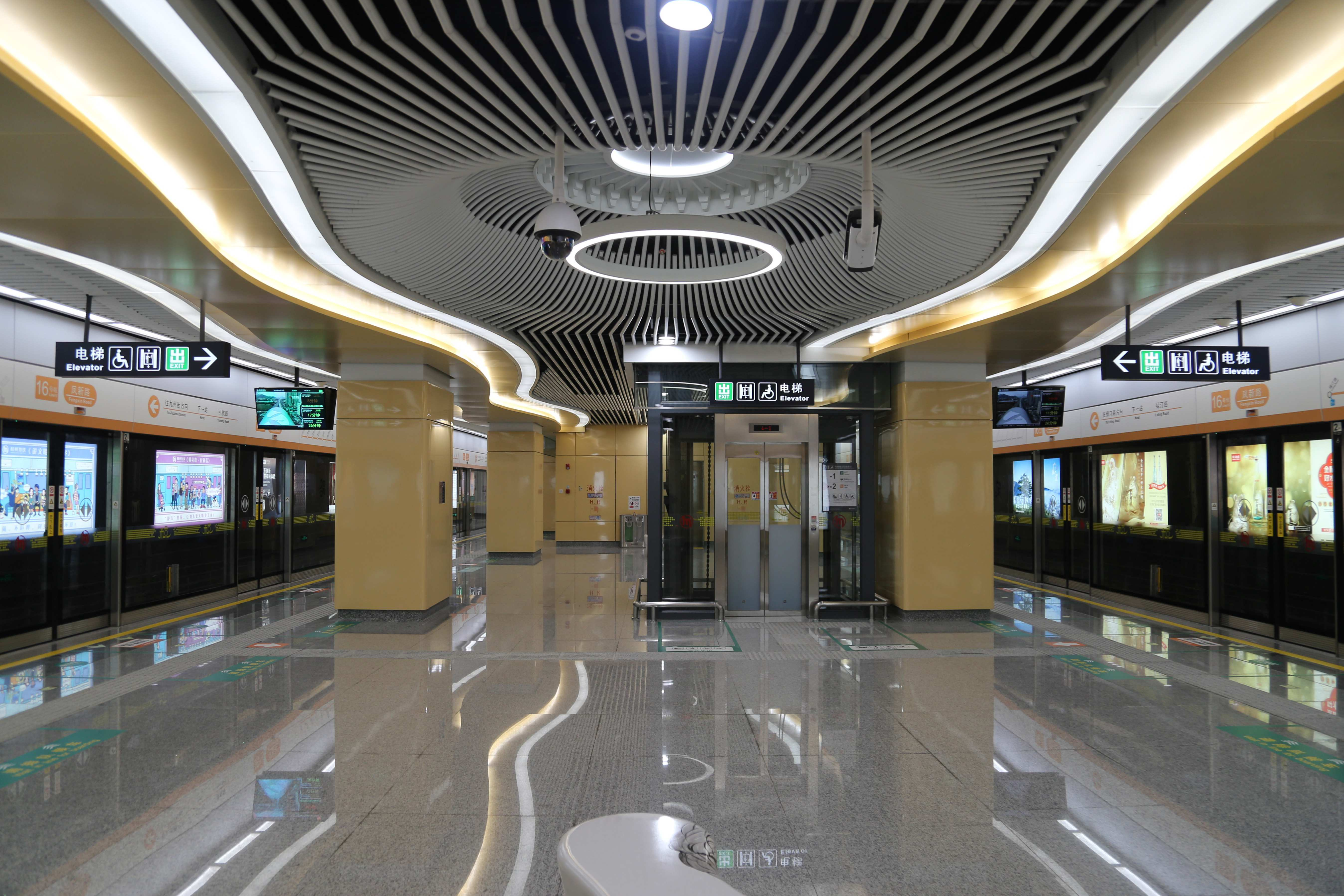 凤新路站站台